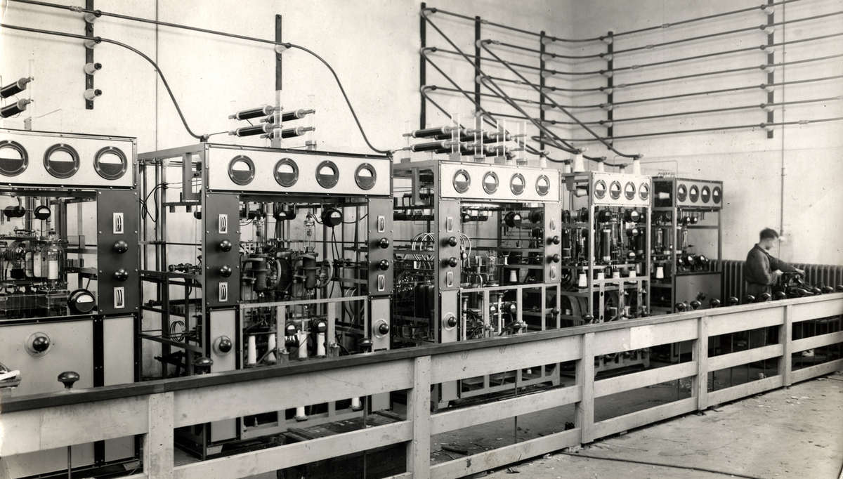 De PHOHI zender: Philips Omroep Holland Indië. Zendlampen en modulatorlampen. Huizen, Nederland, 1928.